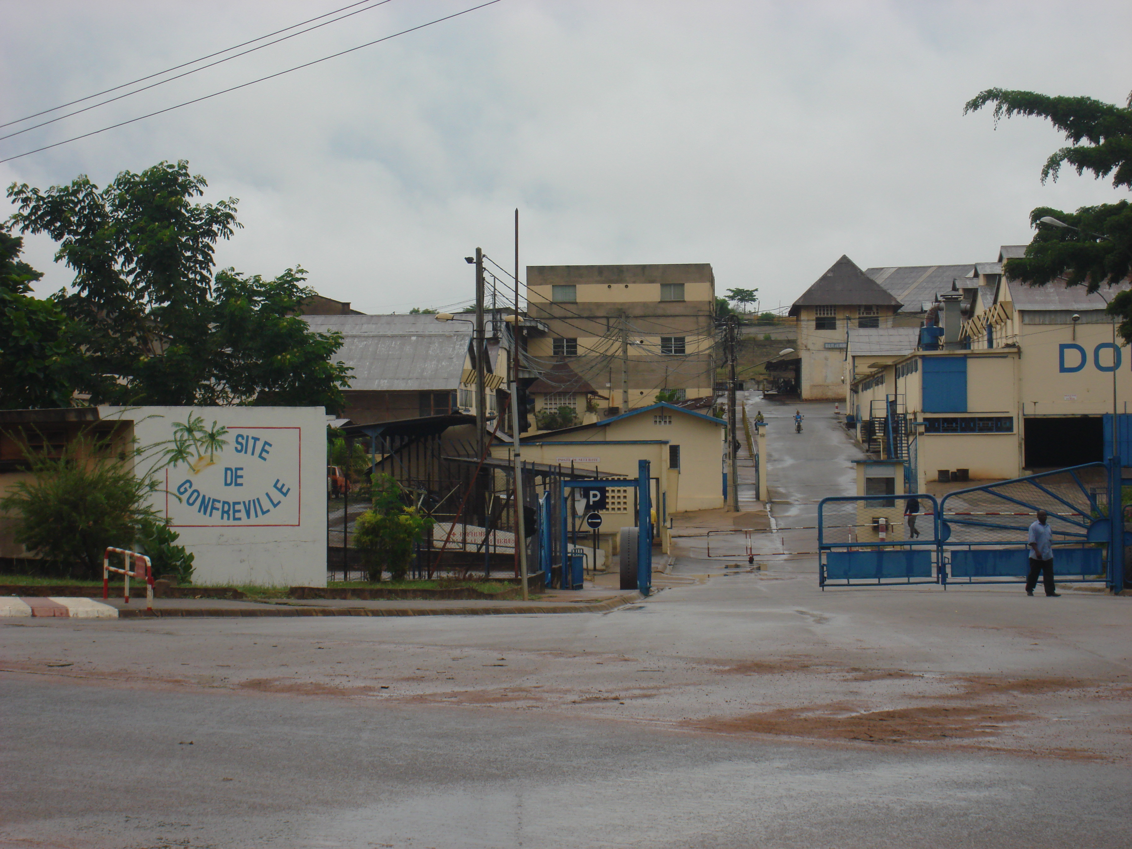 Entrée de l'usine textile de Gonfreville à Bouaké (Côte d'Ivoire)